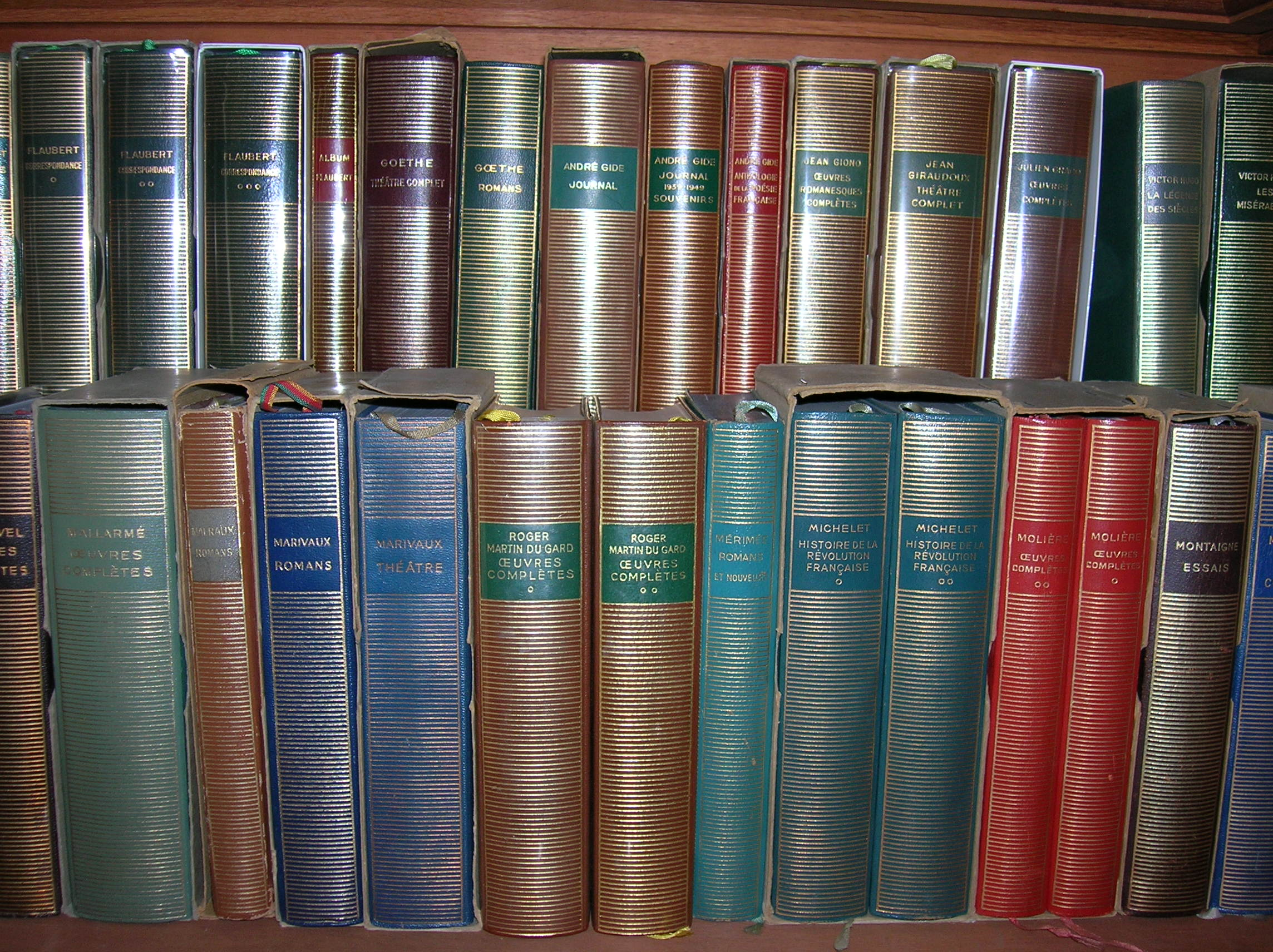 Volumes de la Bibliothèque de la Pléiade